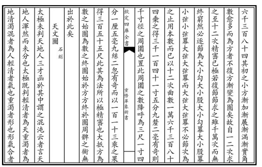 赵友钦割圆术书影